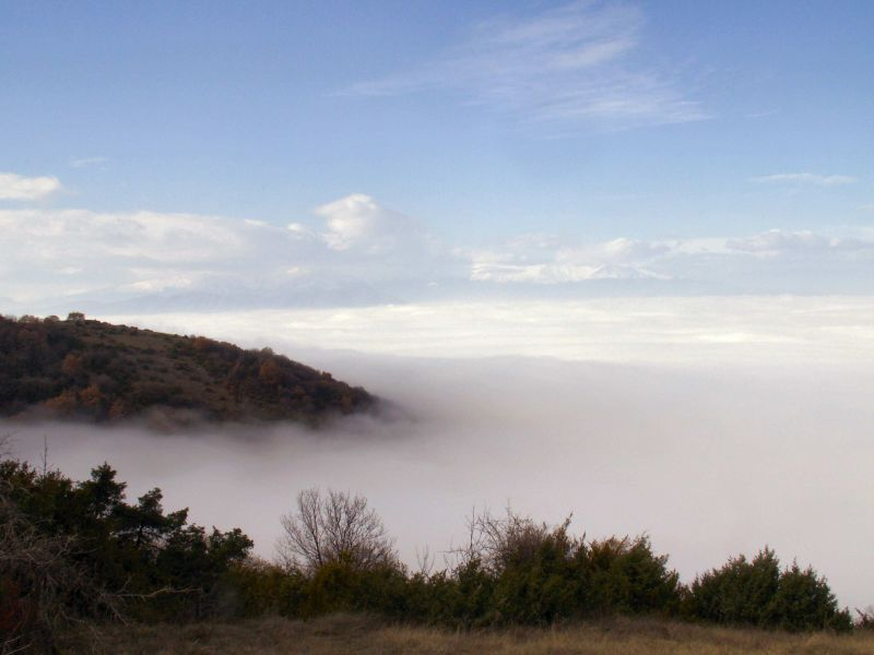 Vodno Autumn 2007 05